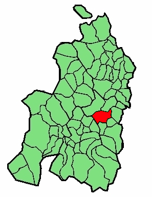 aipaturiko udalerriaren kokapena Nafarroa Beherean